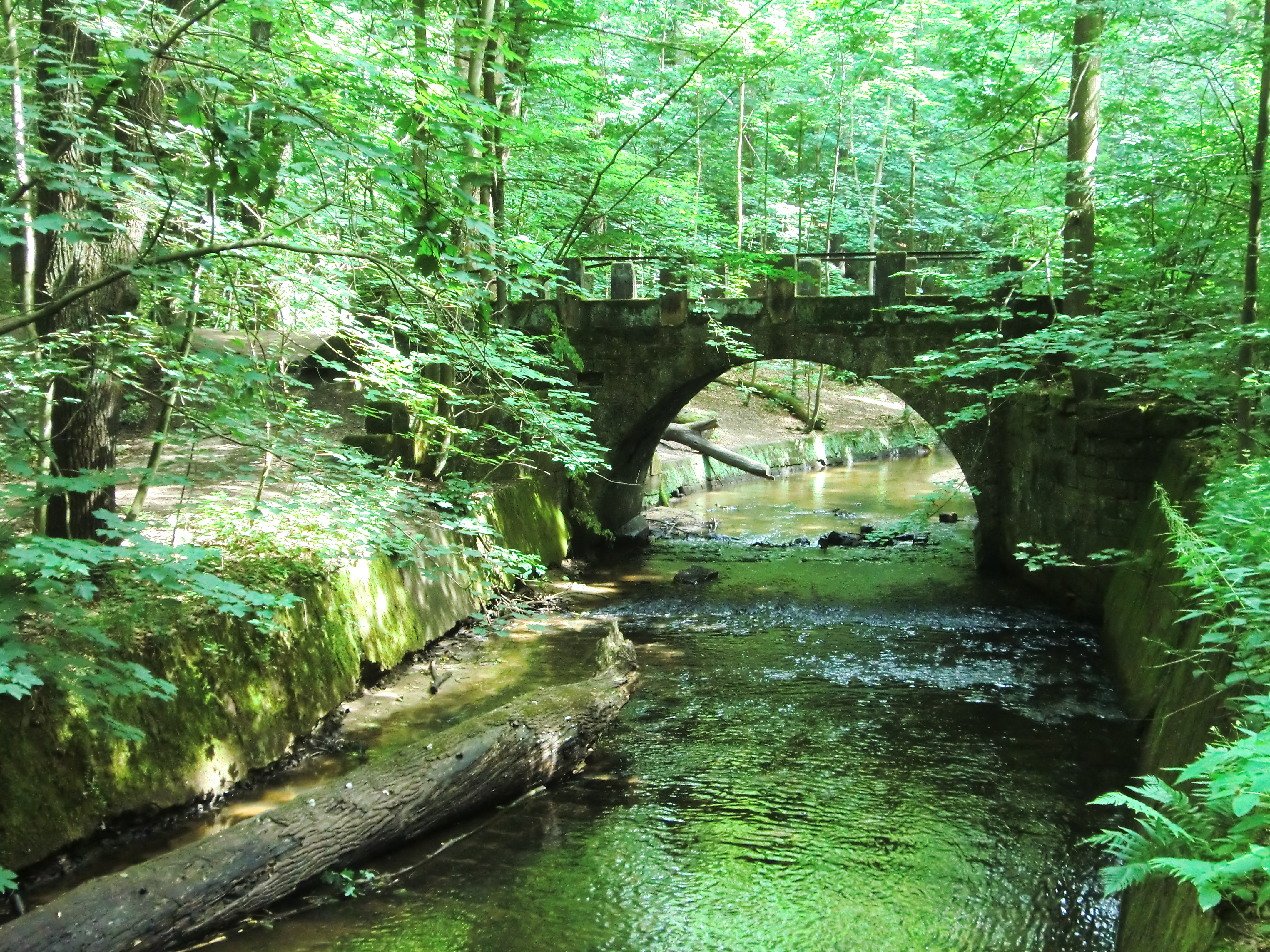 Dresdner Heide-Küchenbrücke 2016